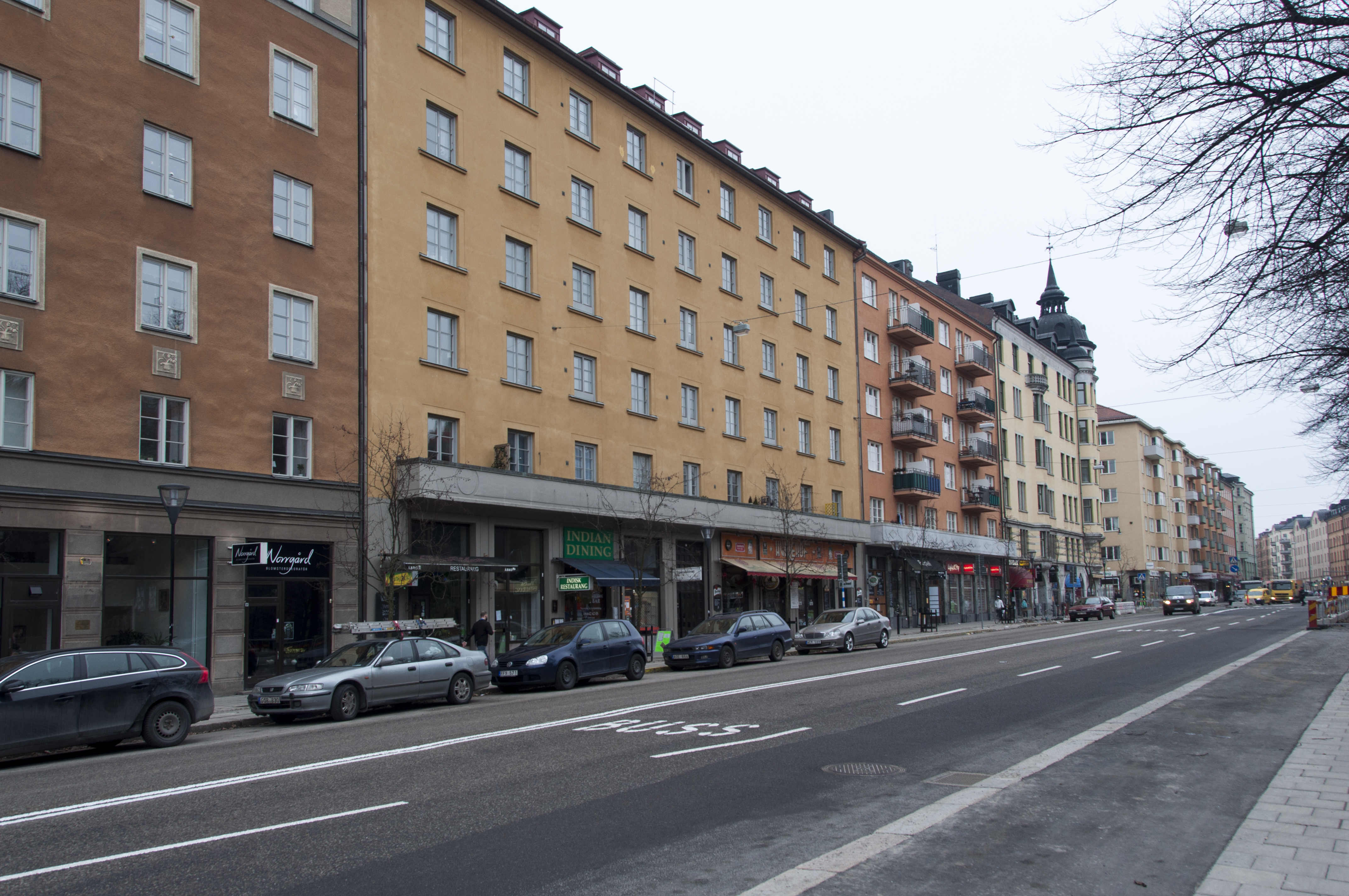 Signalen 2, Folkungagatan 128-130, Nybyggnadsår 1929 - 1930, Carl Åkerblad (Arkitekt) I. G. V. Pettersson (Byggmästare) Seling A. & Pettersson I. G. V. (Byggherre)